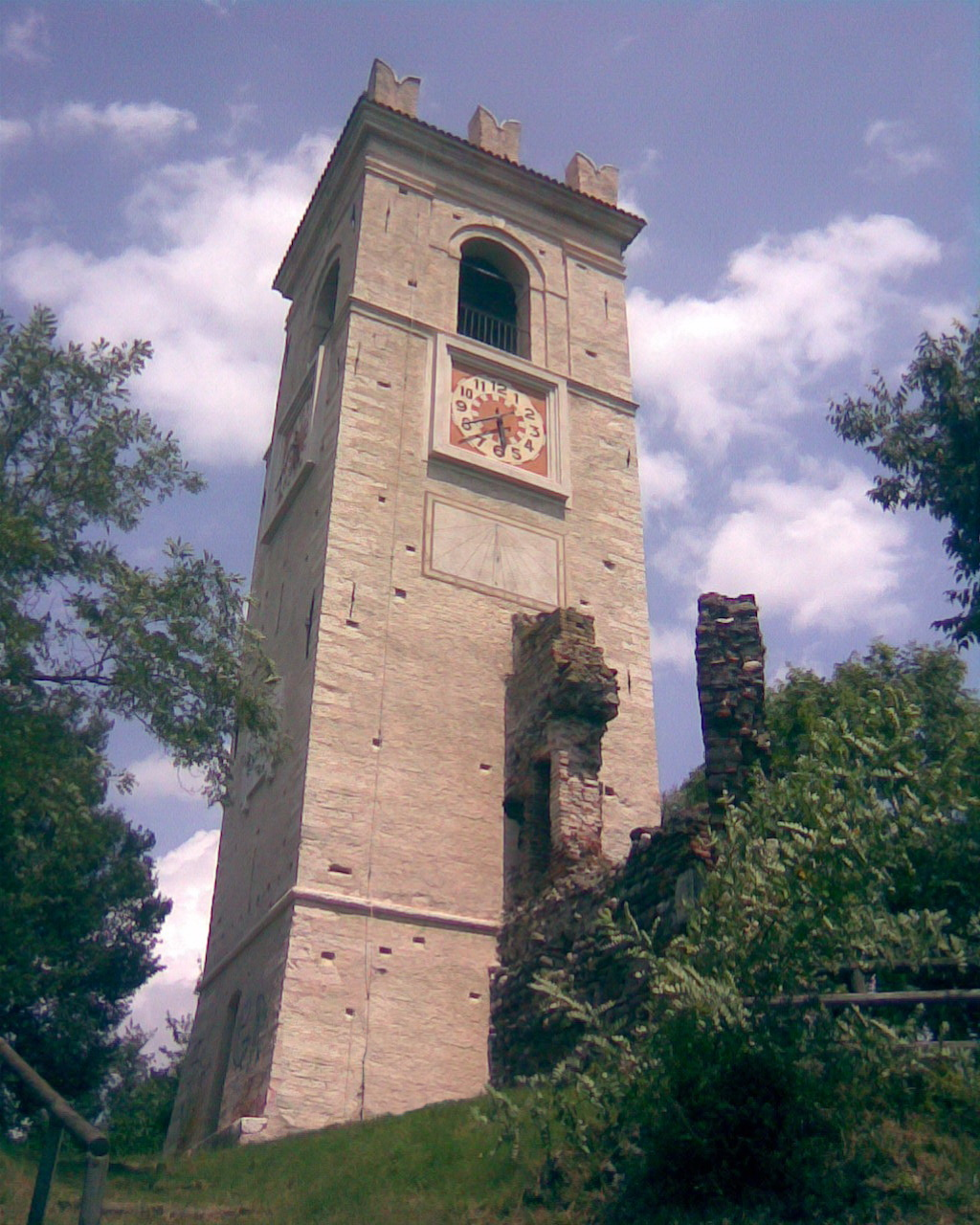 Torre del Castello di Carpenedolo